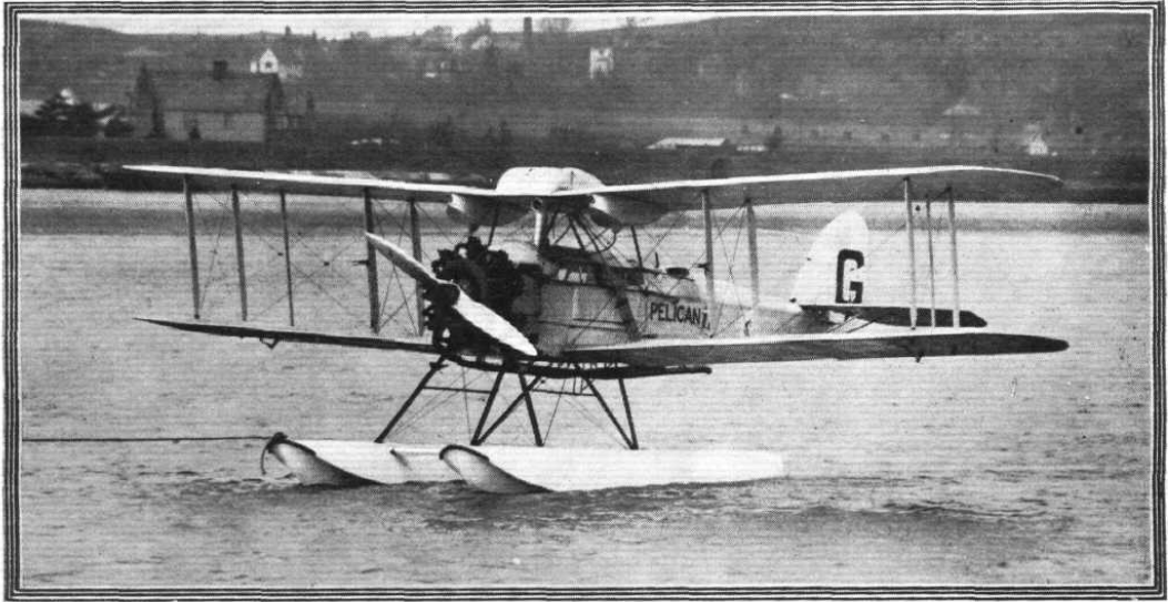 Havilland 50 con motor Bristol Júpiter utilizado como avión mensajero en la ruta que unía Jartum (Sudán) y Nairobi (Kenya). Imagen publicada el 18 de noviembre de 1926 en la edición 934 de la publicación "Flight International" del Reino Unido.